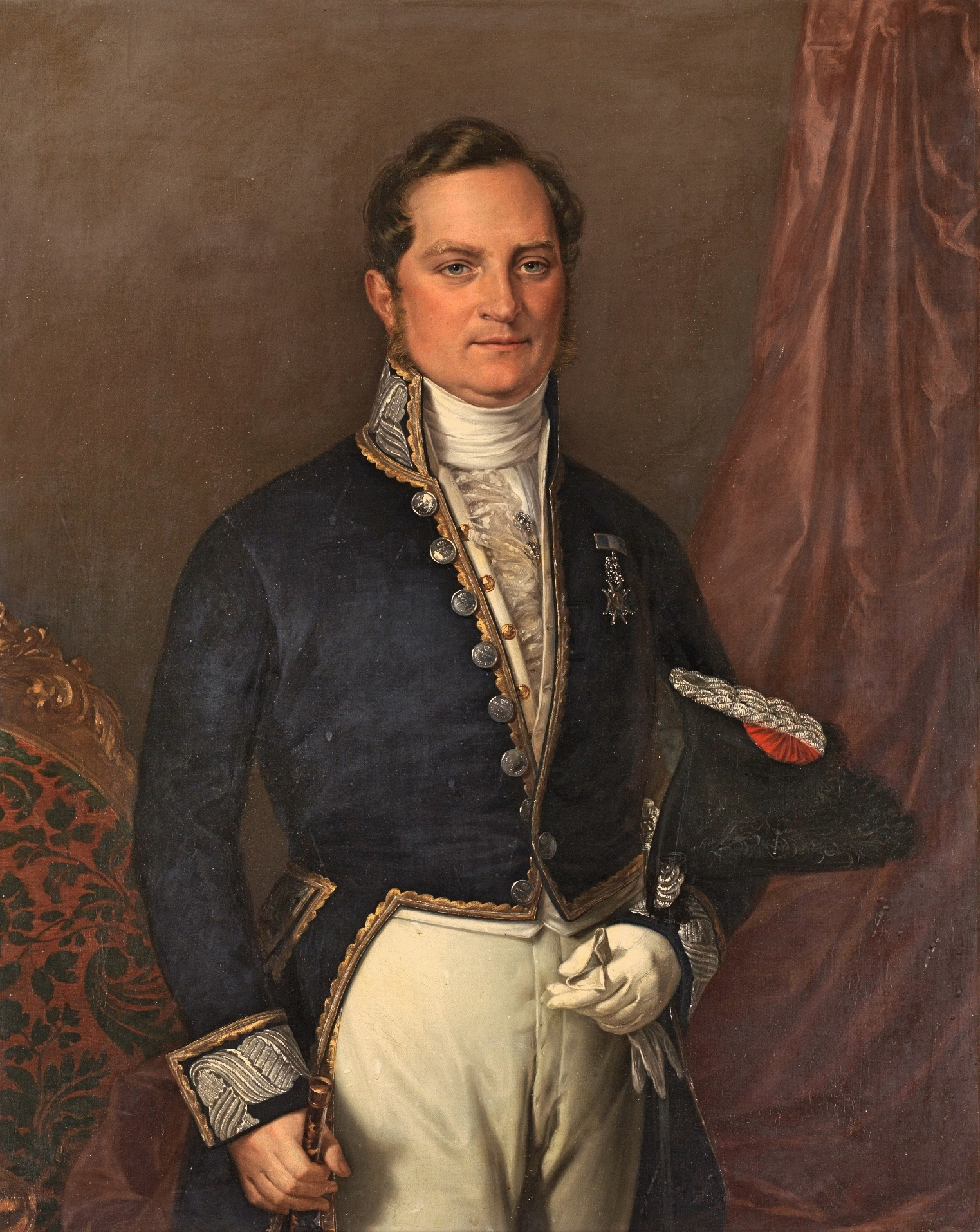 La obra representa a un caballero de la Real y Distinguida Orden de Carlos III, José Agustín de Lecubarri y Gorostiza. Obra del pintor Rafael Tegeo y Díaz.